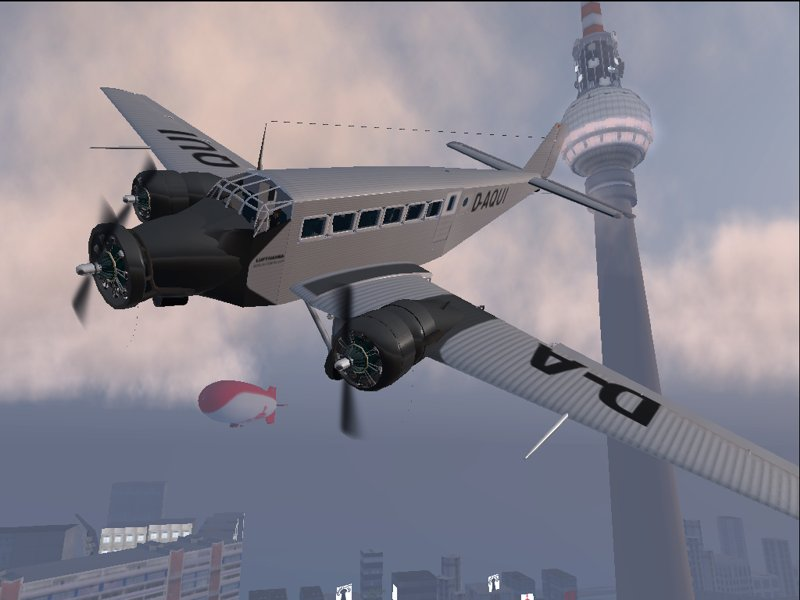 Second Life Vehicles